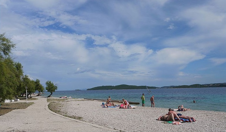 Chorwacja - plaża